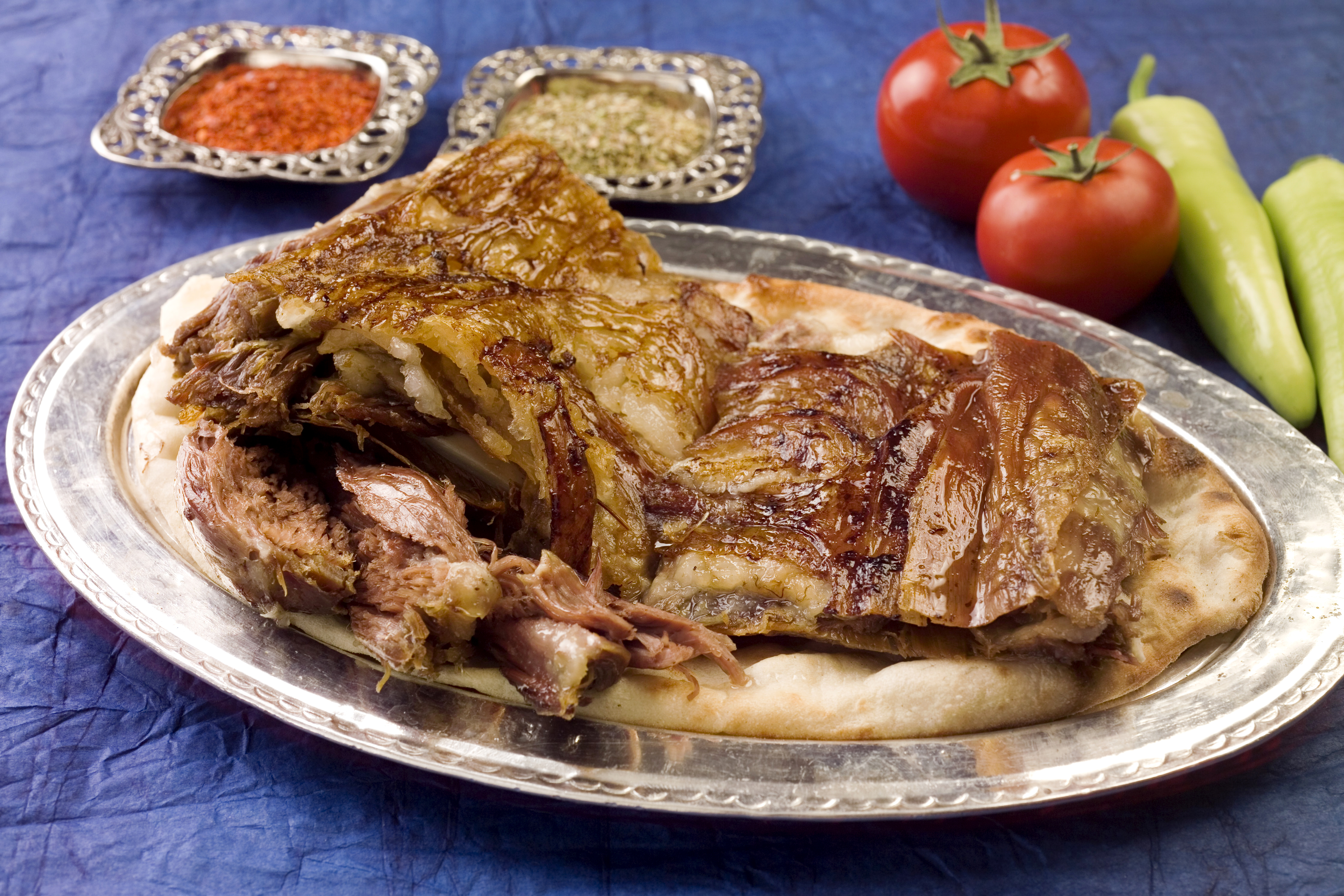 Isparta